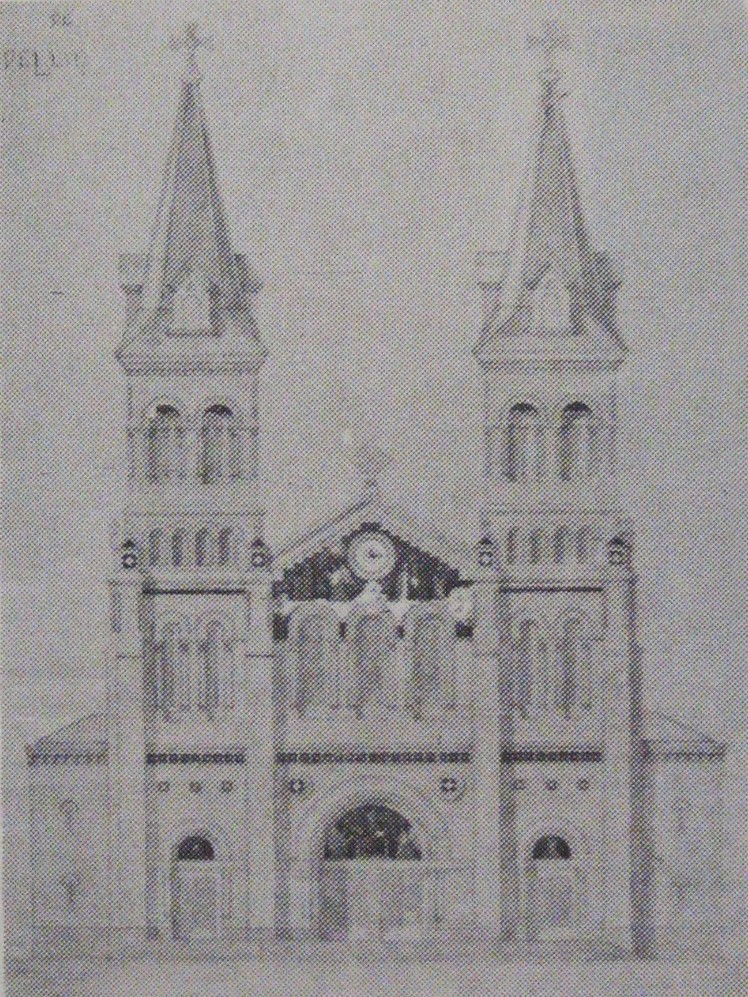 En 1919 el Arzobispo Caycedo contrató al hermano salesiano y arquitecto italiano Giovanni Buscaglione, para que se encargara de las obras de embellecimiento del templo. Buscaglione diseñó el baldaquino, los altares, el púlpito, el Coro y demás obras ornamentales del templo. También se le encargó el diseño y construcción del Seminario Mayor (1919-1928). Además, presentó esta propuesta para modificar la Catedral la cual fue rechazada. Propuesta de Giovanni Buscaglione para modificar la Catedral de Medellín, la cual fue rechazada.